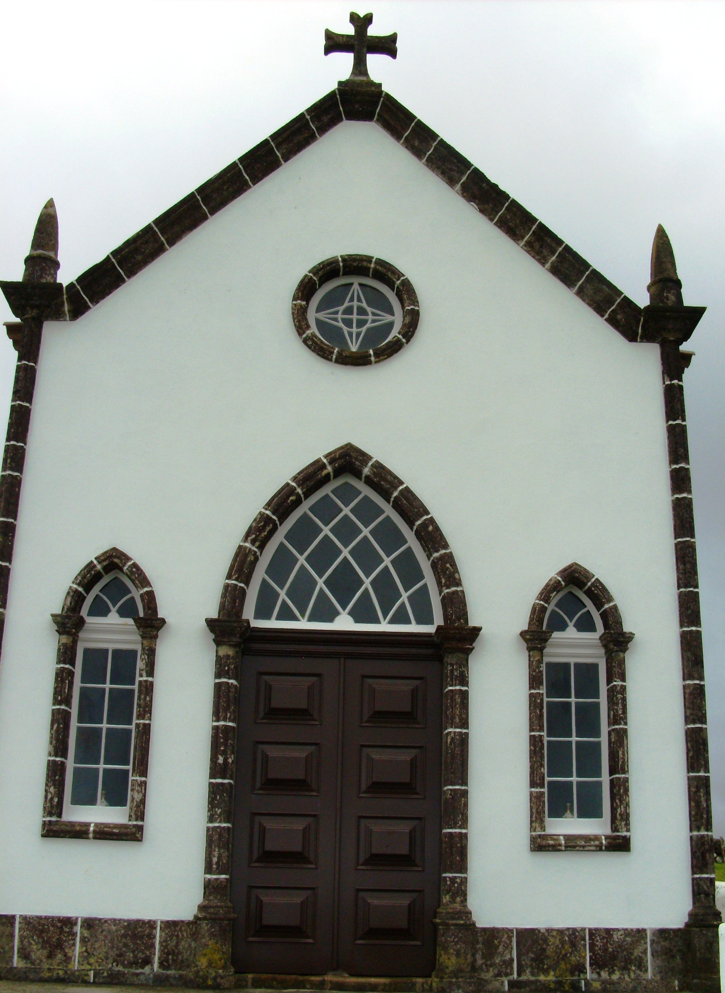 Ermida de Nossa Senhora de Lurdes, Ilha de Santa Maria (Açores), Portugal.